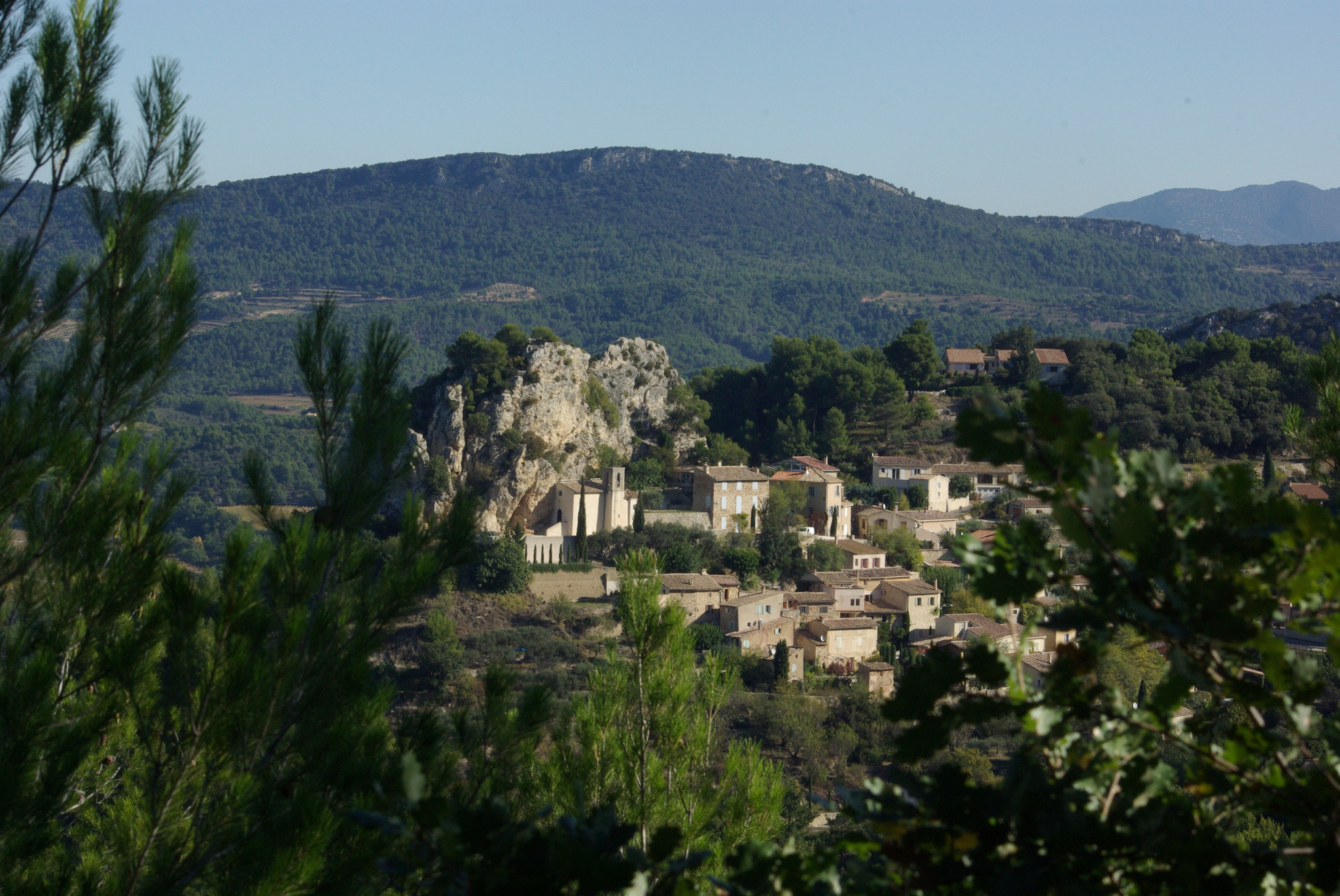 La Roque Alric sur son oppidum